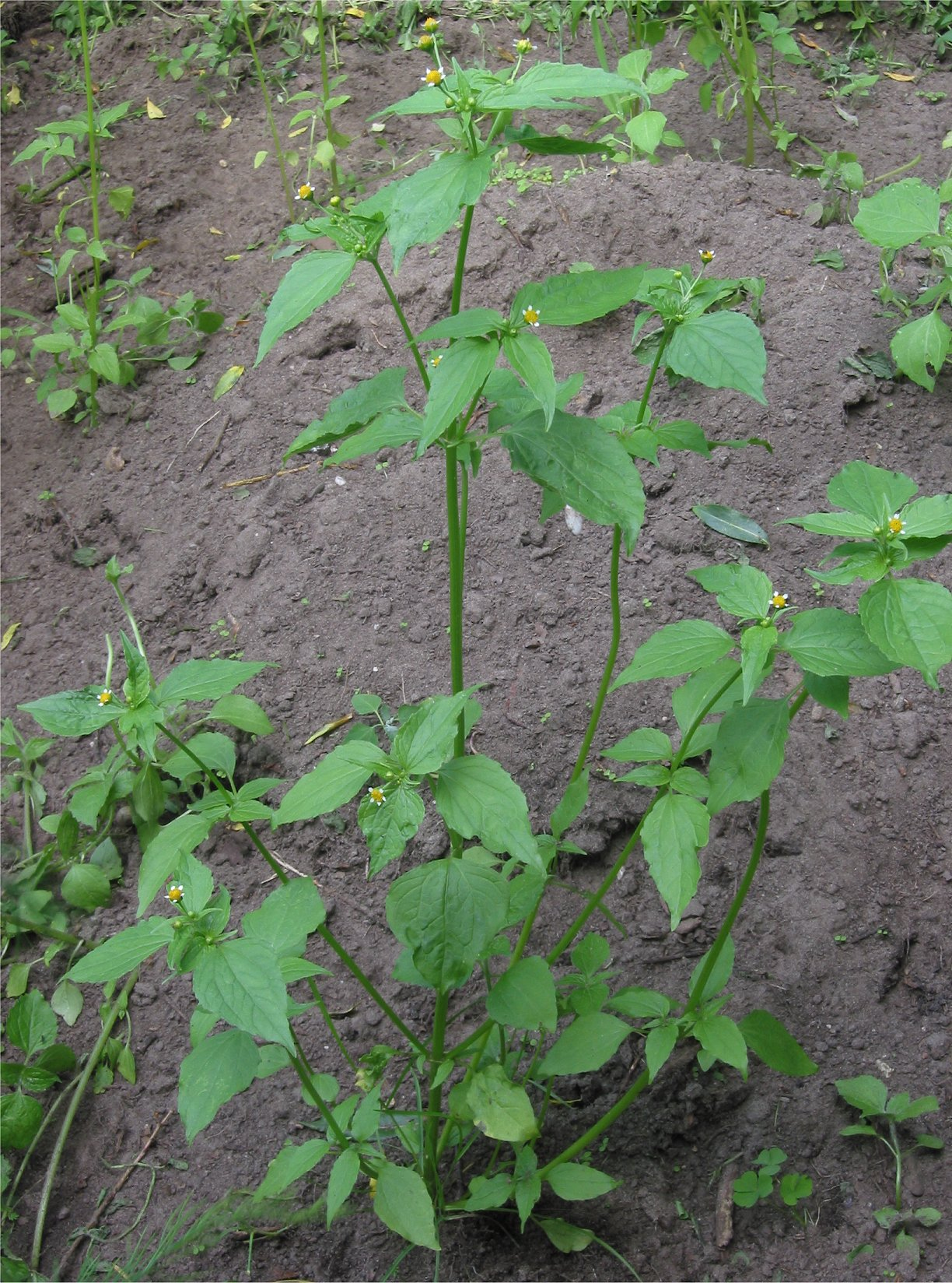 (nl: Kaal knopkruid plant) Galinsoga parviflora